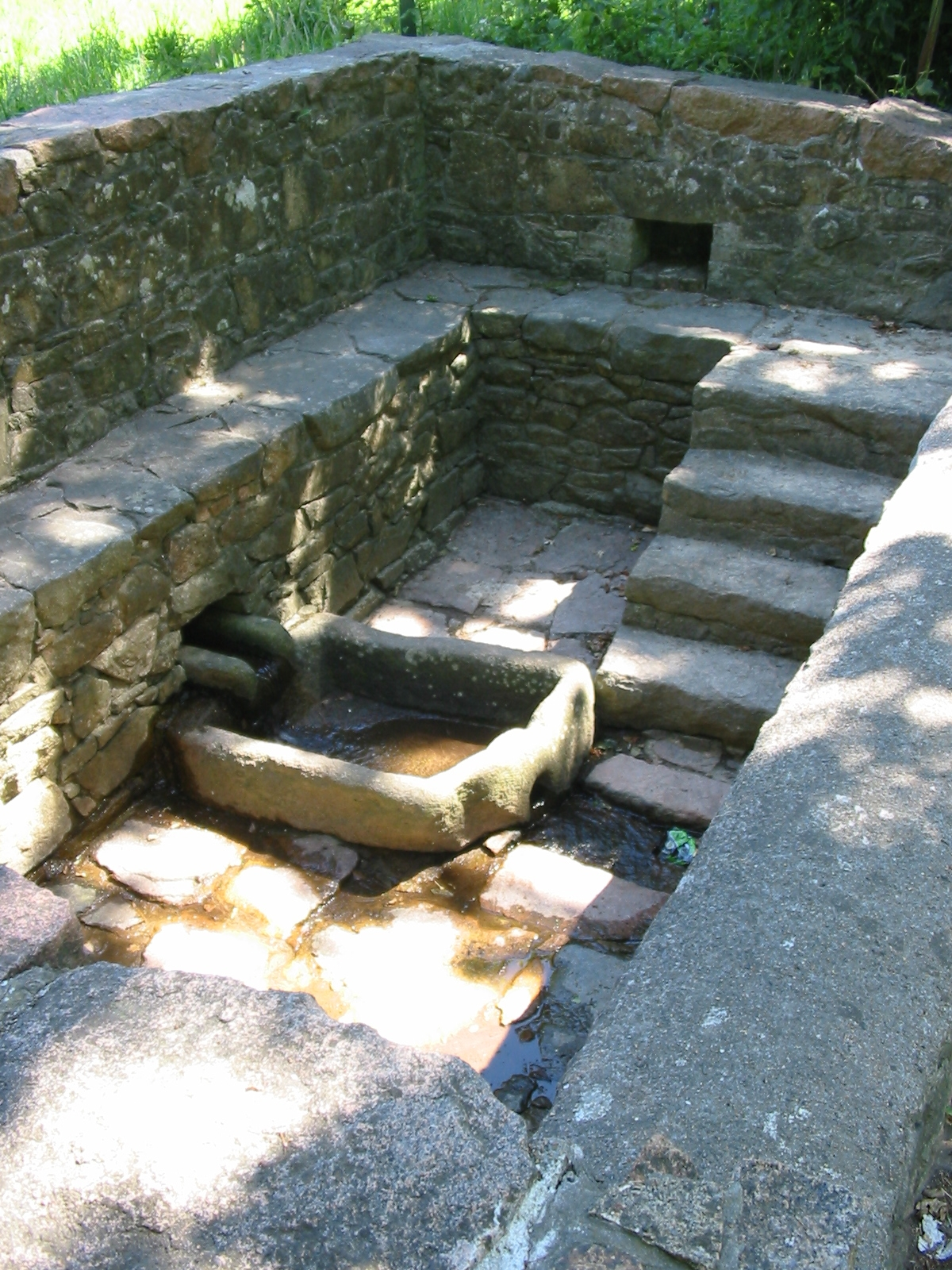 Lavoir de la Rue des Prés, Jersey. National Trust for Jersey property